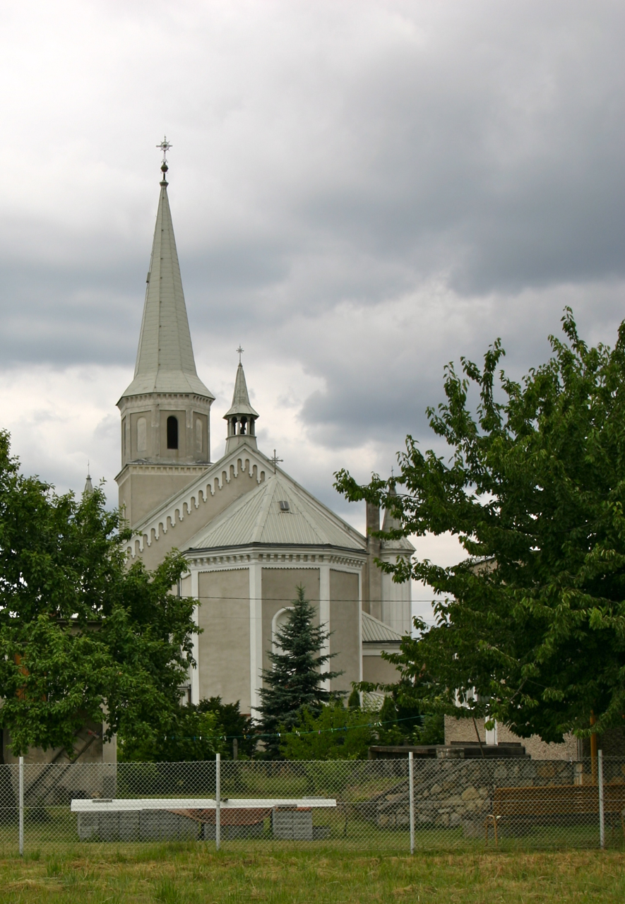 Obrowiec, ul. Krapkowicka 38 - rzymskokatolicki kościół parafialny pw. św. Jana Chrzciciela, 1869–88